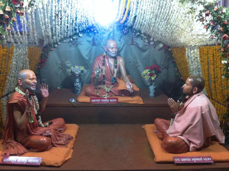 Statues of Yogiji Maharaj, Pramukh Swami at Ambli Vali Pol